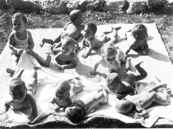 החינוך המשותף